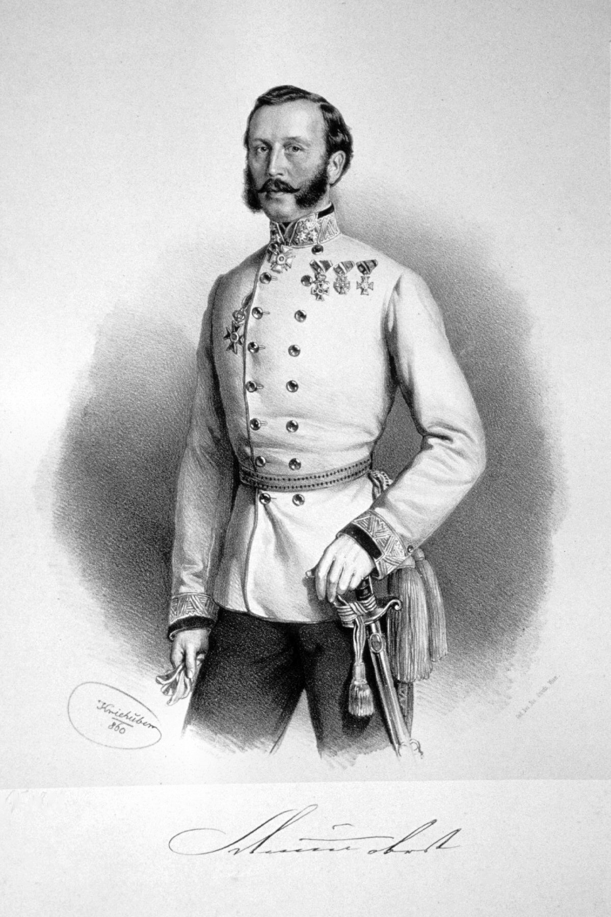 Adolf Schütte, Freiherr von Warensberg (1812-1889) k. k. Feldmarschallleutnant, Lithographie von Josef Kriehuber, 1860